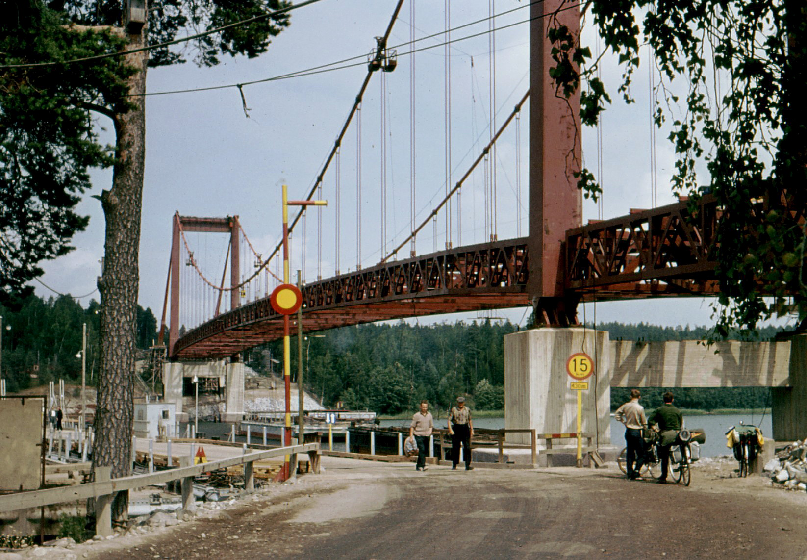 Rävsundsbron under uppförande på sommaren 1963